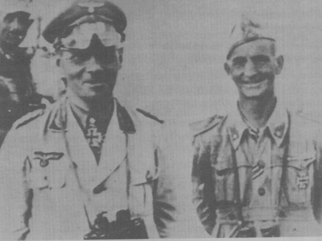 Erwin Rommel con il colonnello italiano Enrico Maretti comandante del 132° Reggimento carri della 132ª Divisione corazzata "Ariete" nel deserto libico